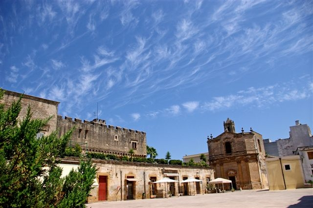 Scorcio del castello di San Vito dei Normanni, Brindisi